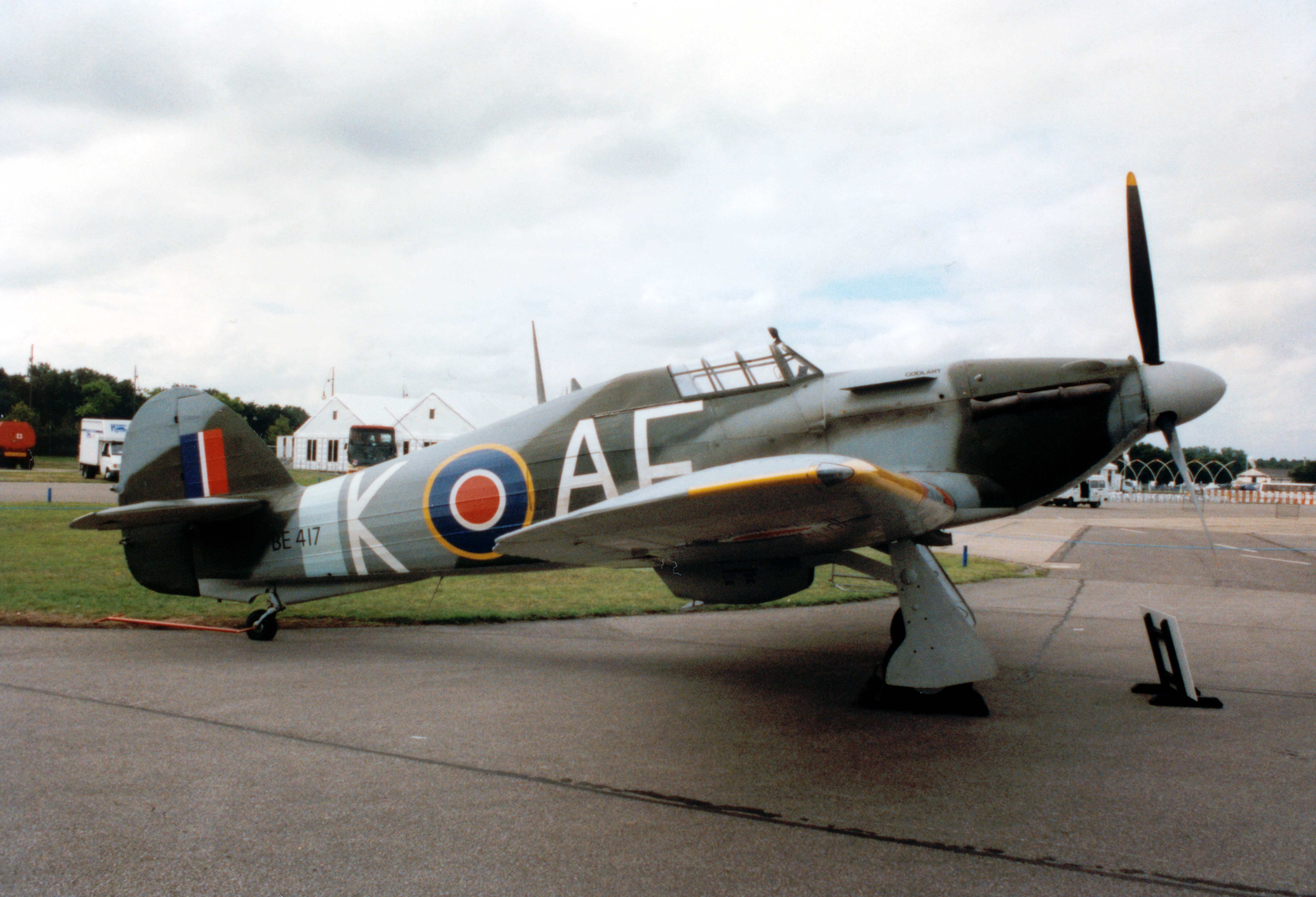 Beschreibung: Hawker Hurricane aufgenommen in Farnborough Quelle: Fotografiert am September de:1996 Fotograf: Alexander Flühmann Lizenzstatus: GNU FDL, Publikation mit Genehmigung des Fotografen